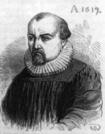 Salomon de Caus (1576–1629)